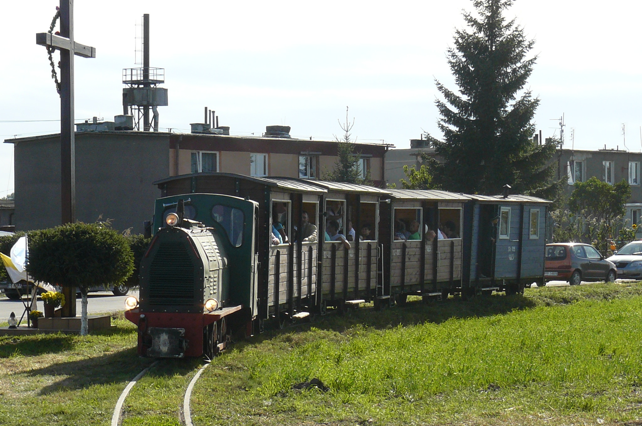 Wyrzyska Kolej Powiatowa. Przejazdy specjalne na odcinku Czajsze - Wysoczka - Czajcze z okazji dożynek. 8.9.2013r.